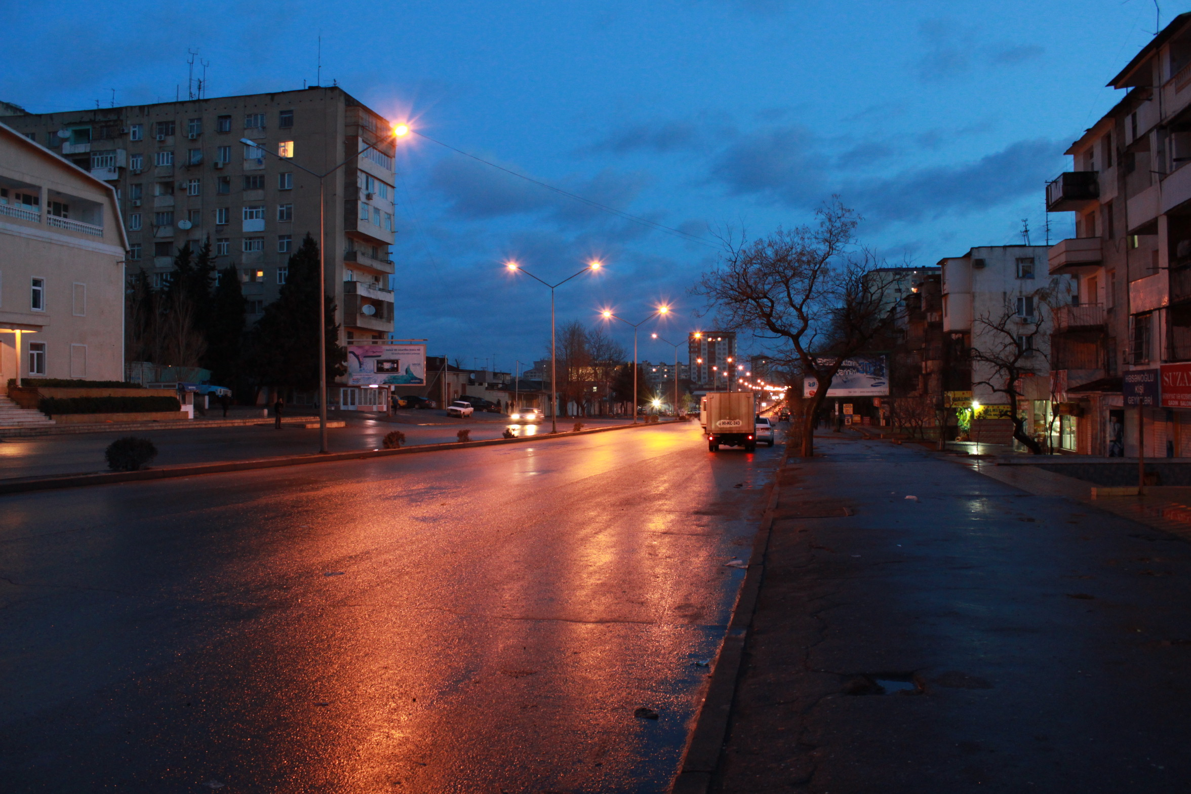 Рассвет. Баку. ул. Шарифзаде. Ясамал. Метро Иншаатчилар.